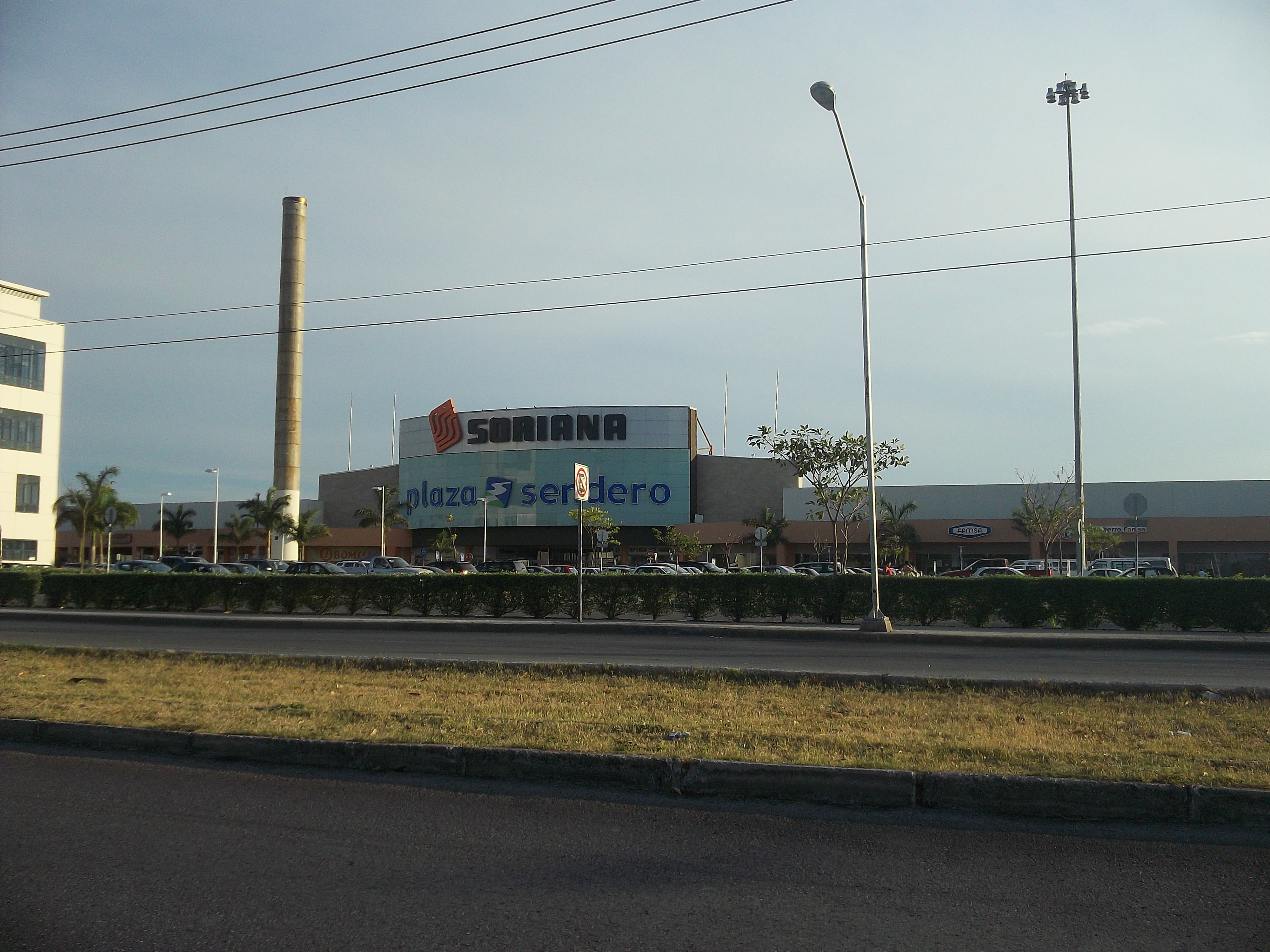 Plaza Sendero en Mérida, Yucatán.